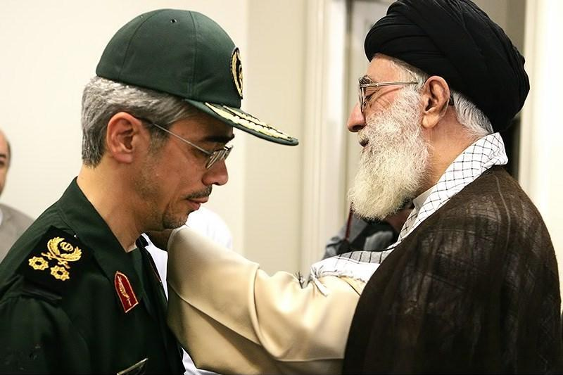 سرلشکر محمد باقری رئیس جدید ستاد کل نیروهای مسلح - حضرت آیت‌الله خامنه‌ای رهبر معظم انقلاب اسلامی عصر امروز طی حکمی سردار سرلشکر پاسدار محمدحسین باقری افشردی را به سمت رئیس ستاد کل نیروهای مسلح منصوب کردند.